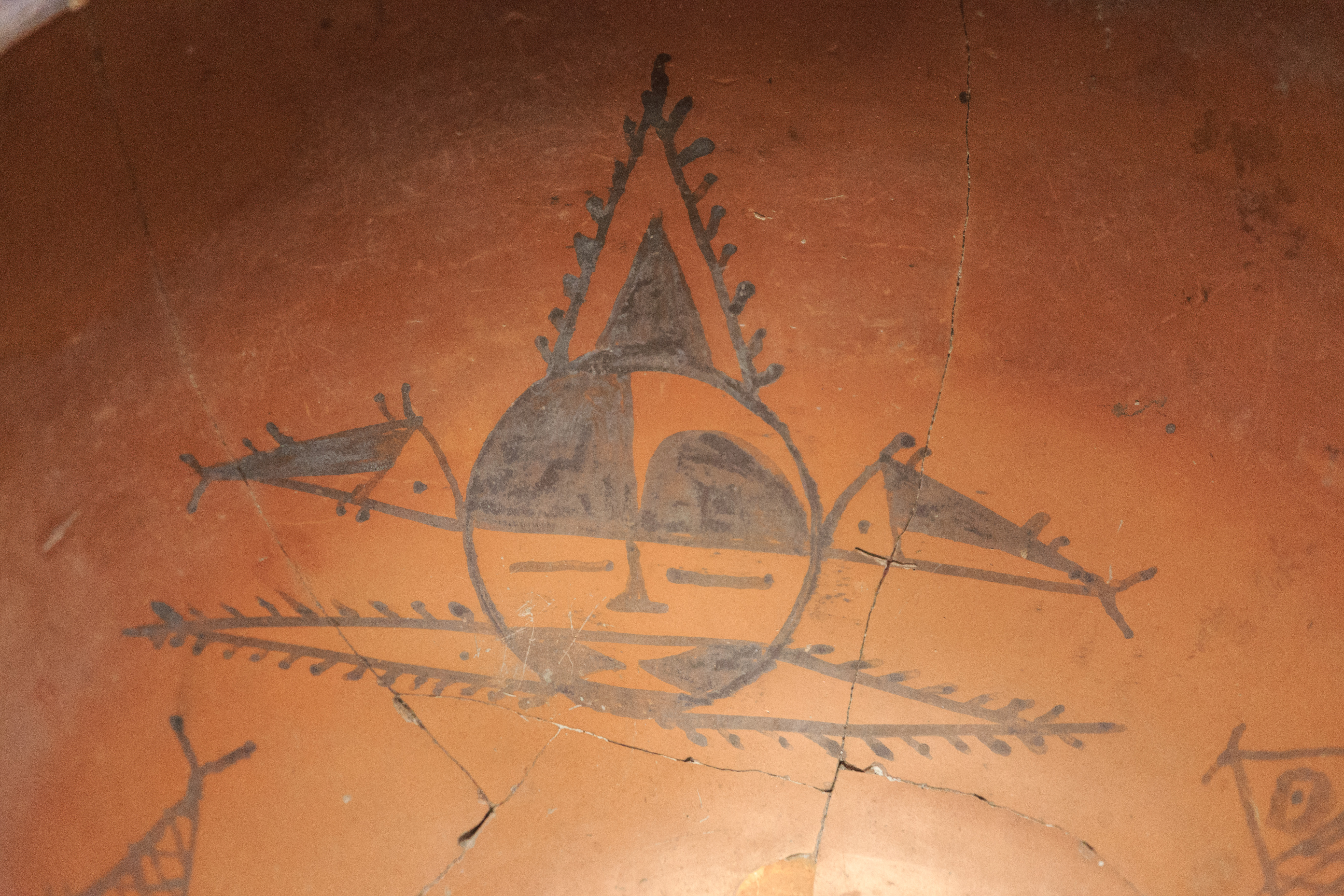 中国国家博物馆—— 人面鱼纹彩陶盆，仰韶文化，1955年陕西西安半坡出土